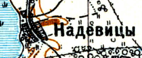 Топографическая карта Ленинградской области, квадрат Vc-29 (Батецкая), деревня Надевицы